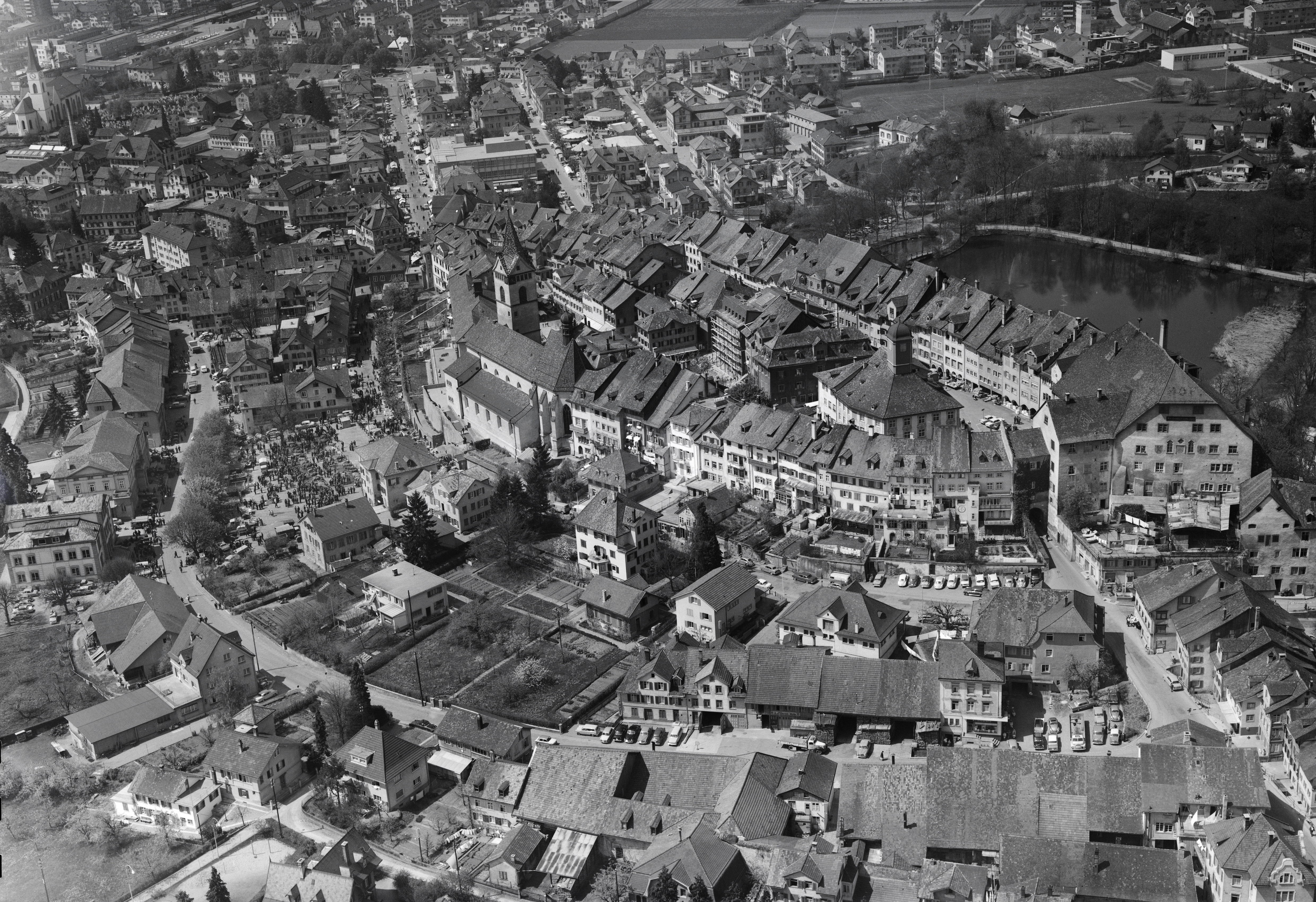 Die Altstadt von Wil (SG) im Hintergrund der Weier. (1963)